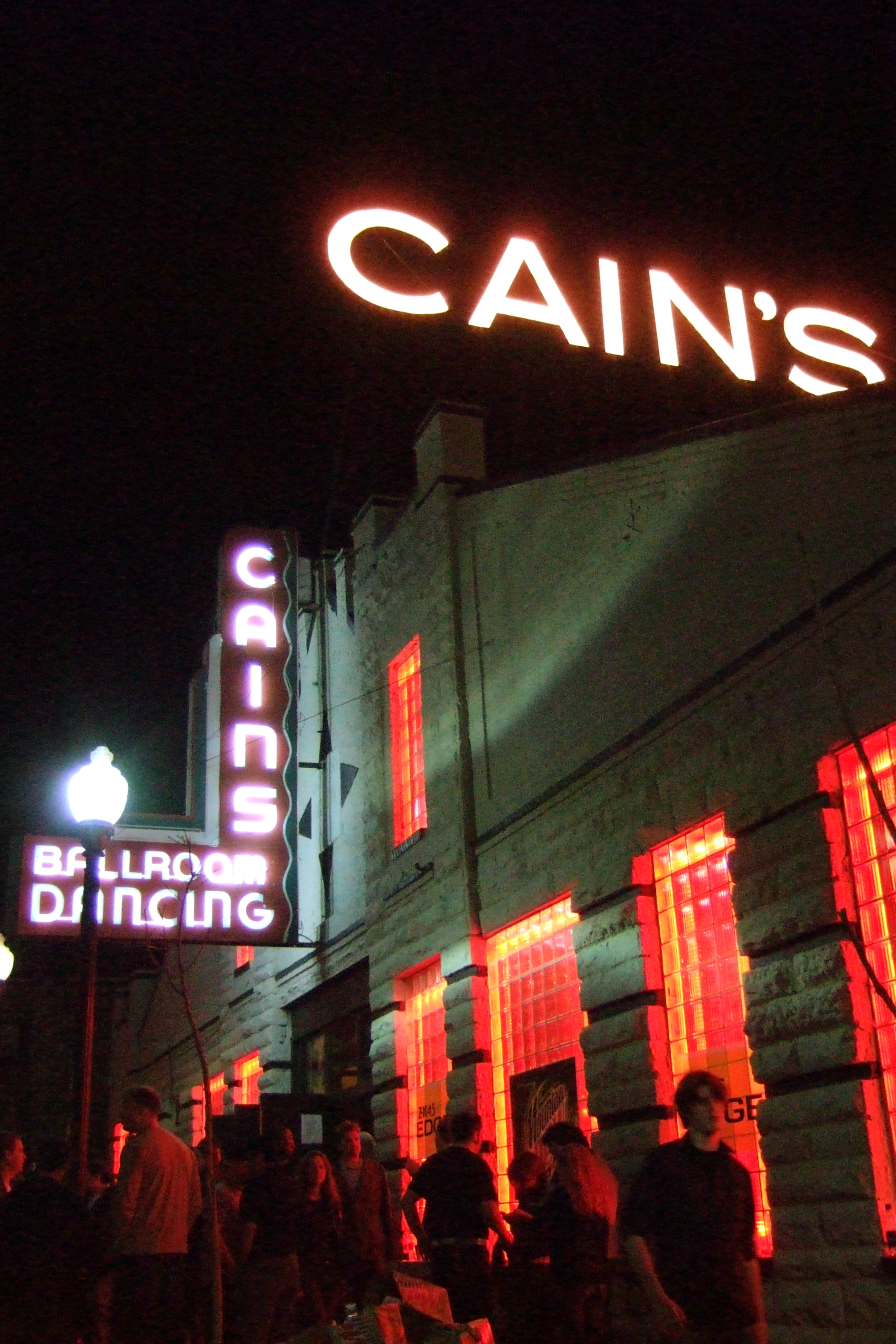 Cain's Ballroom in Tulsa, Oklahoma at night.